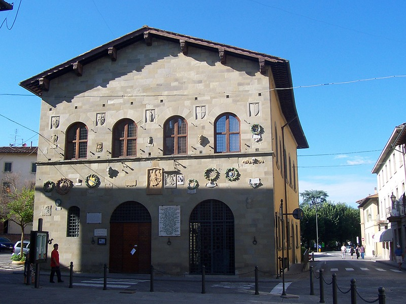 Borgo San Lorenzo - Palazzo del Podestà (Biblioteca Comunale)